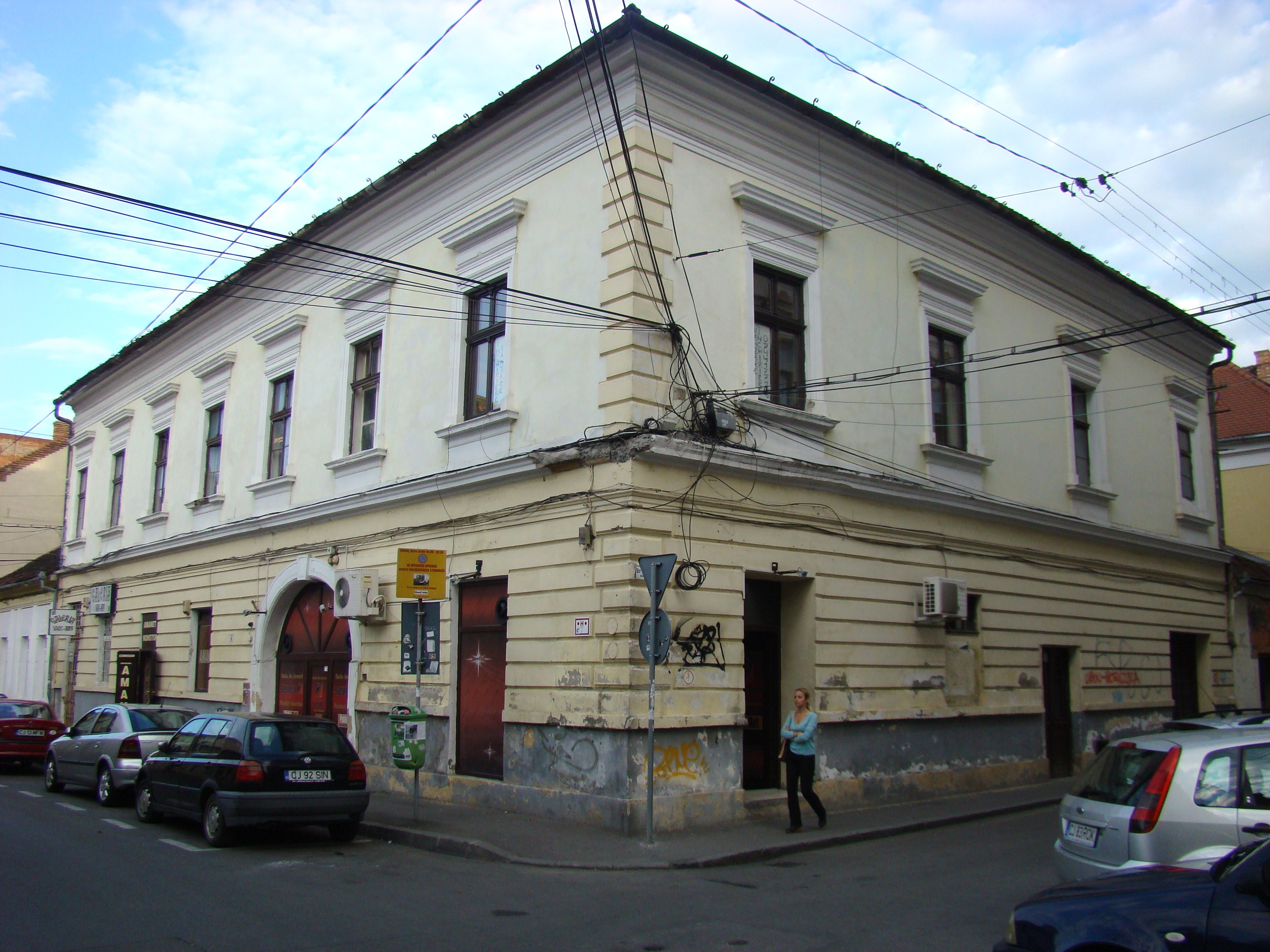 Clădire monument istoric, str.Iuliu Maniu nr.8, pe colț cu str. Bolyai Janos nr. 6